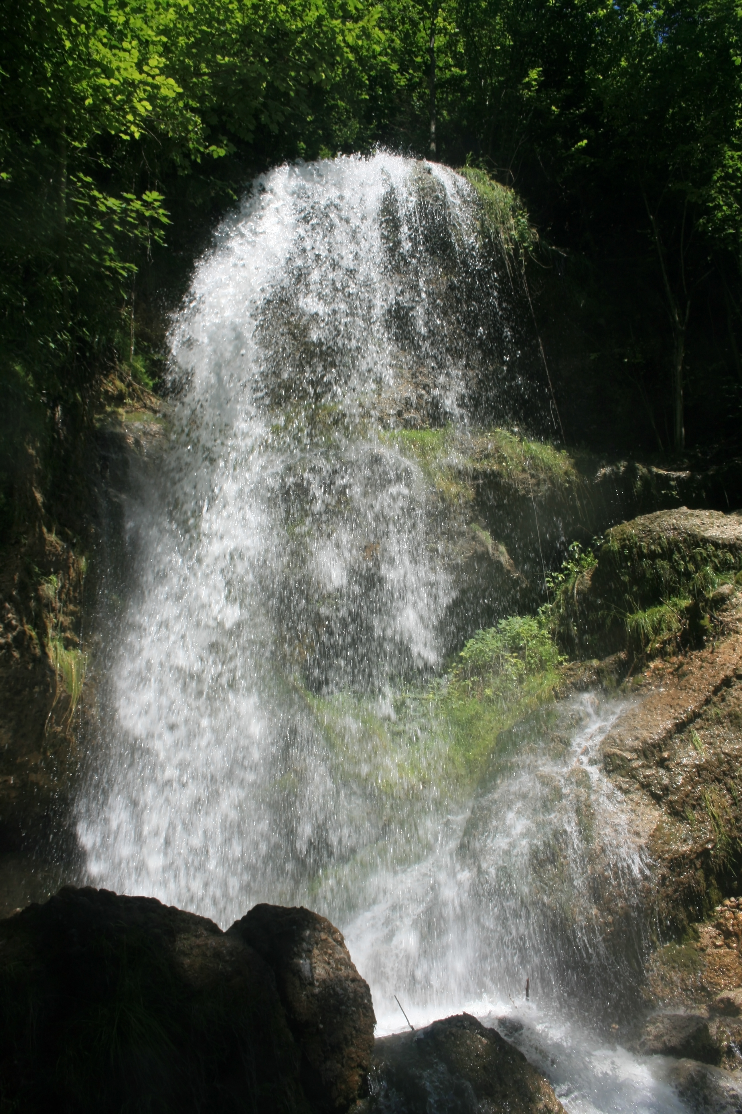 Der Mollnerbach kurz vor der Mündung in die Steyr (Steyrschlucht in Molln, Oberösterreich)